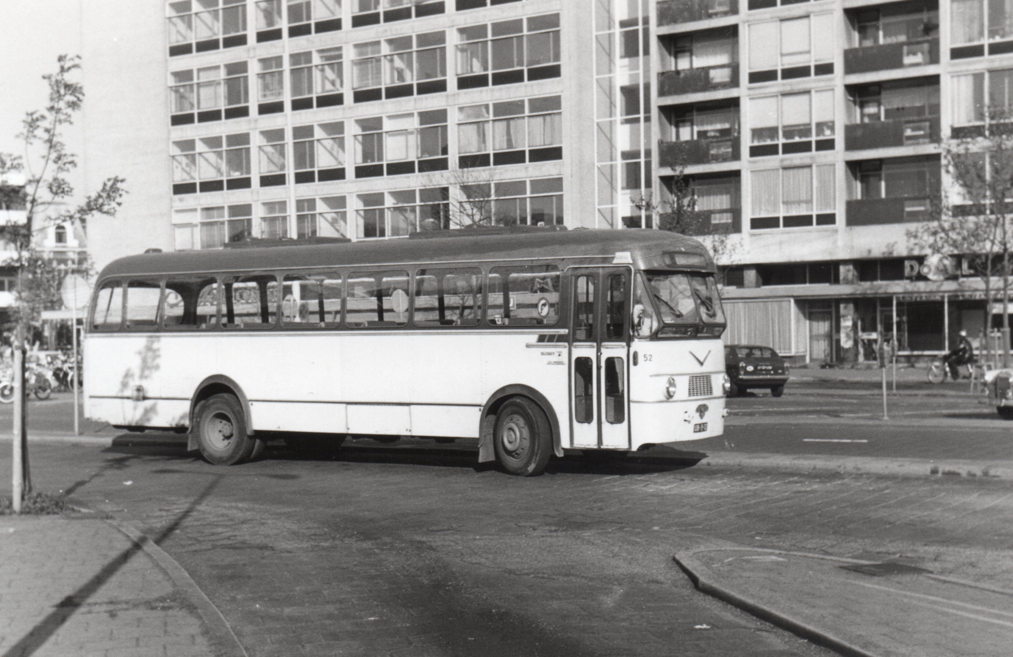 Leyland Tiger Cub/Verheul, Maarse & Kroon 52, bouwjaar 1960, in Leiden, Stationsplein, 1972